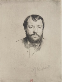 Ernest Hoschedé collectionneur